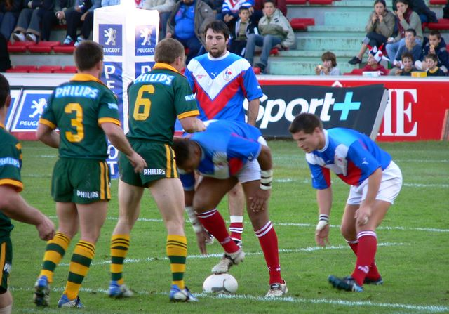 France-Australie à Toulouse, le dimanche 21 novembre 2004